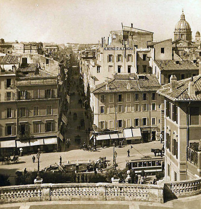 Piazza di Spagna